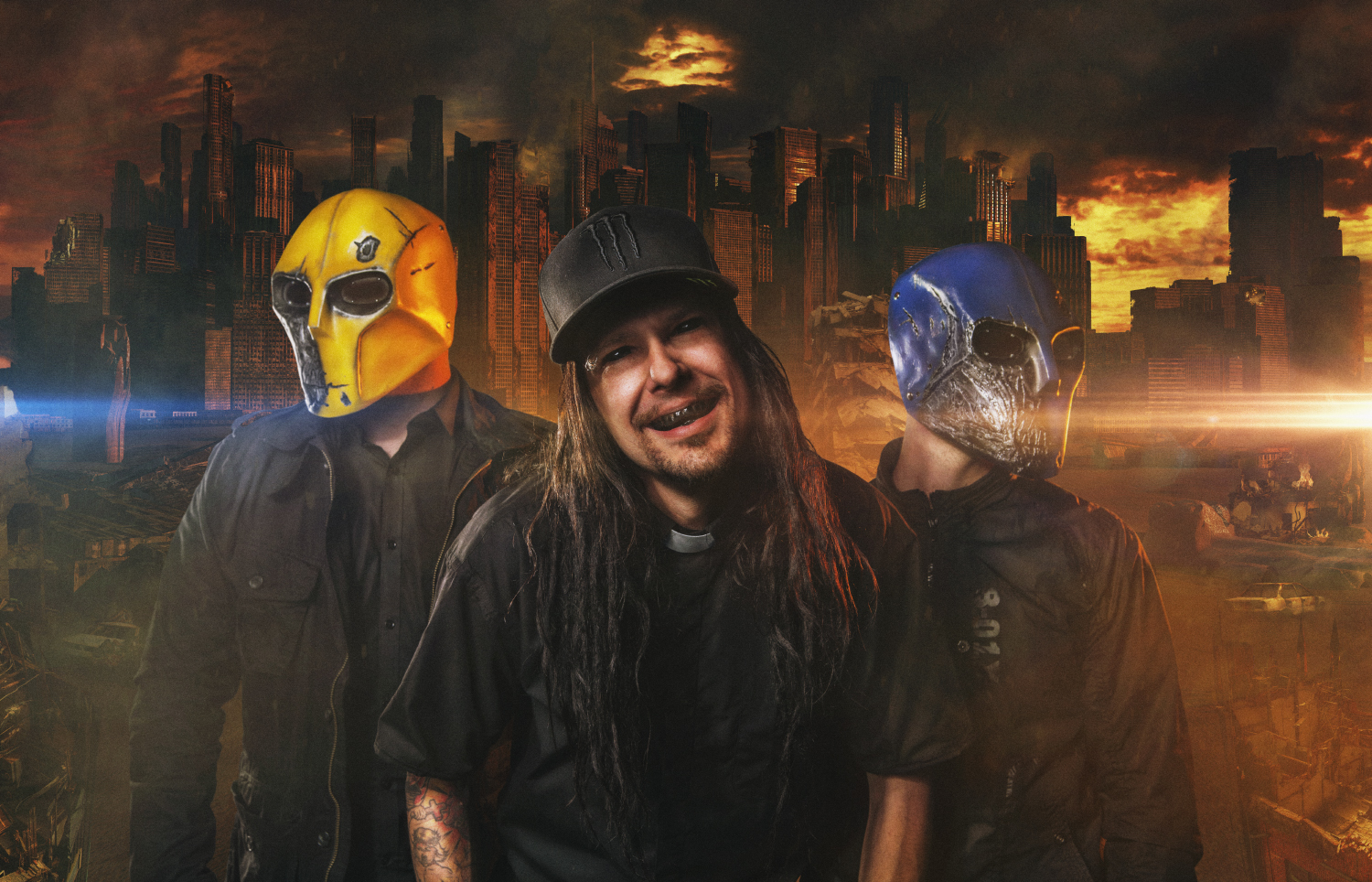 Killbot